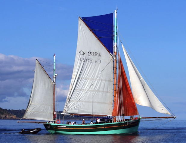 L'ancien dundee thonier La Nébuleuse